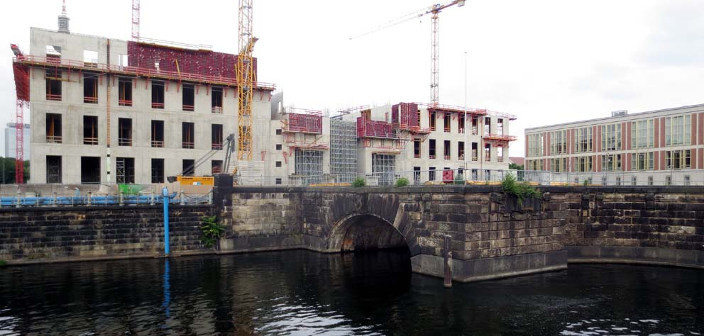 Wiederaufbau des Berliner Stadtschlosses. Baufortschritt vom 7. August 2014. Blick auf die Westfassade.